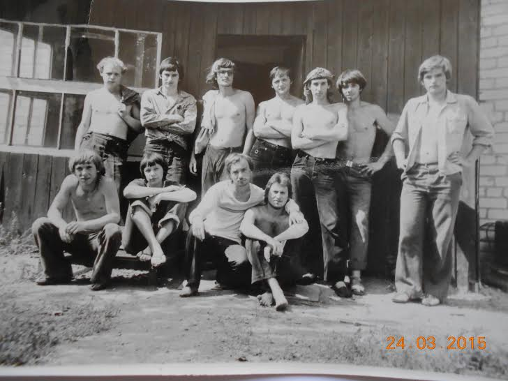 Робочі світлин ЗПДЕ "Жовтнева" 1980 рік. с.Петро-Михайлівка надані для публікацій учасником і фотокором археологічної експедиції Валерієм Чорним